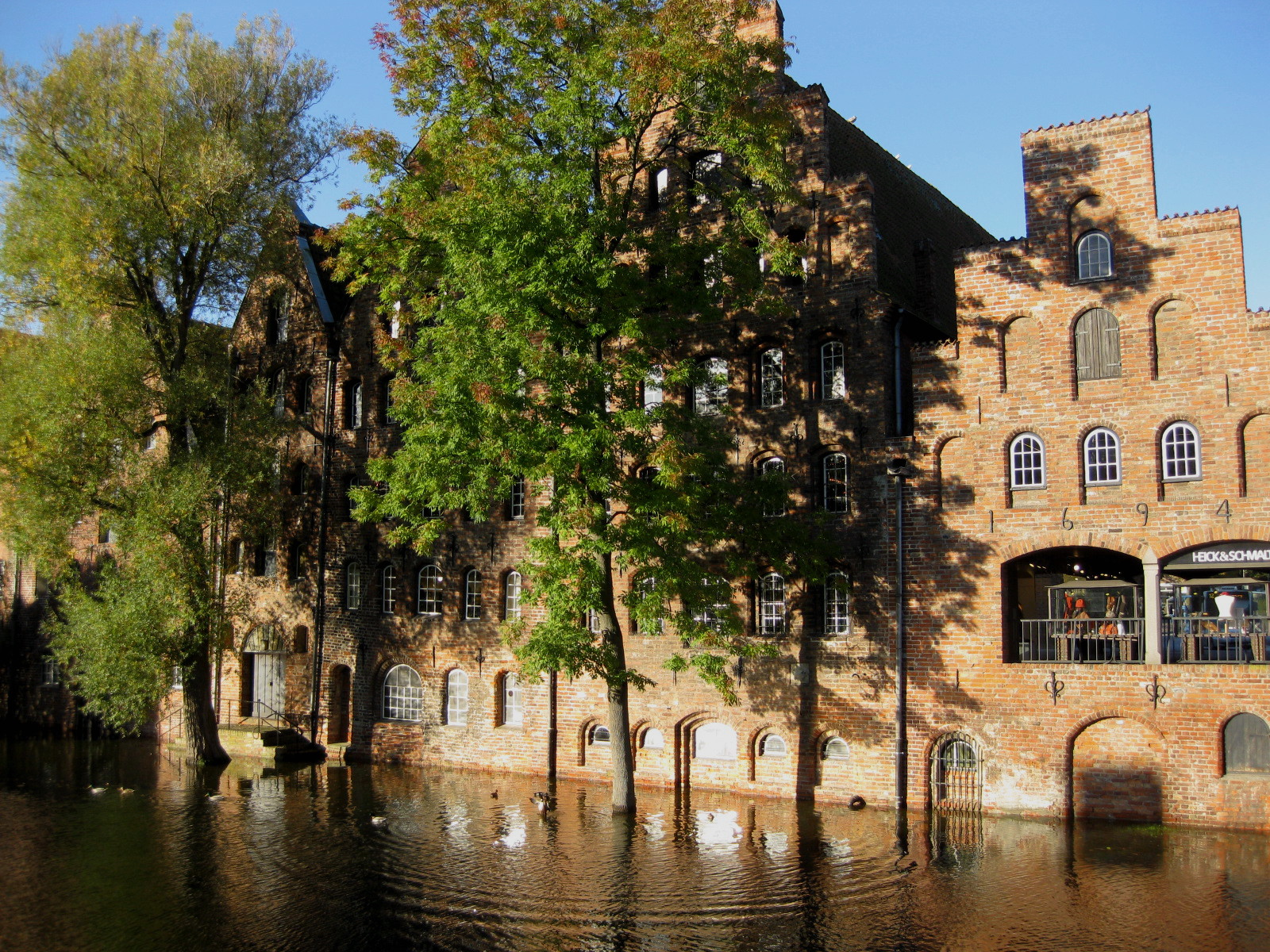 Salzspeicher in Lübeck bei Hochwasser der Trave am 15. Oktober 2009